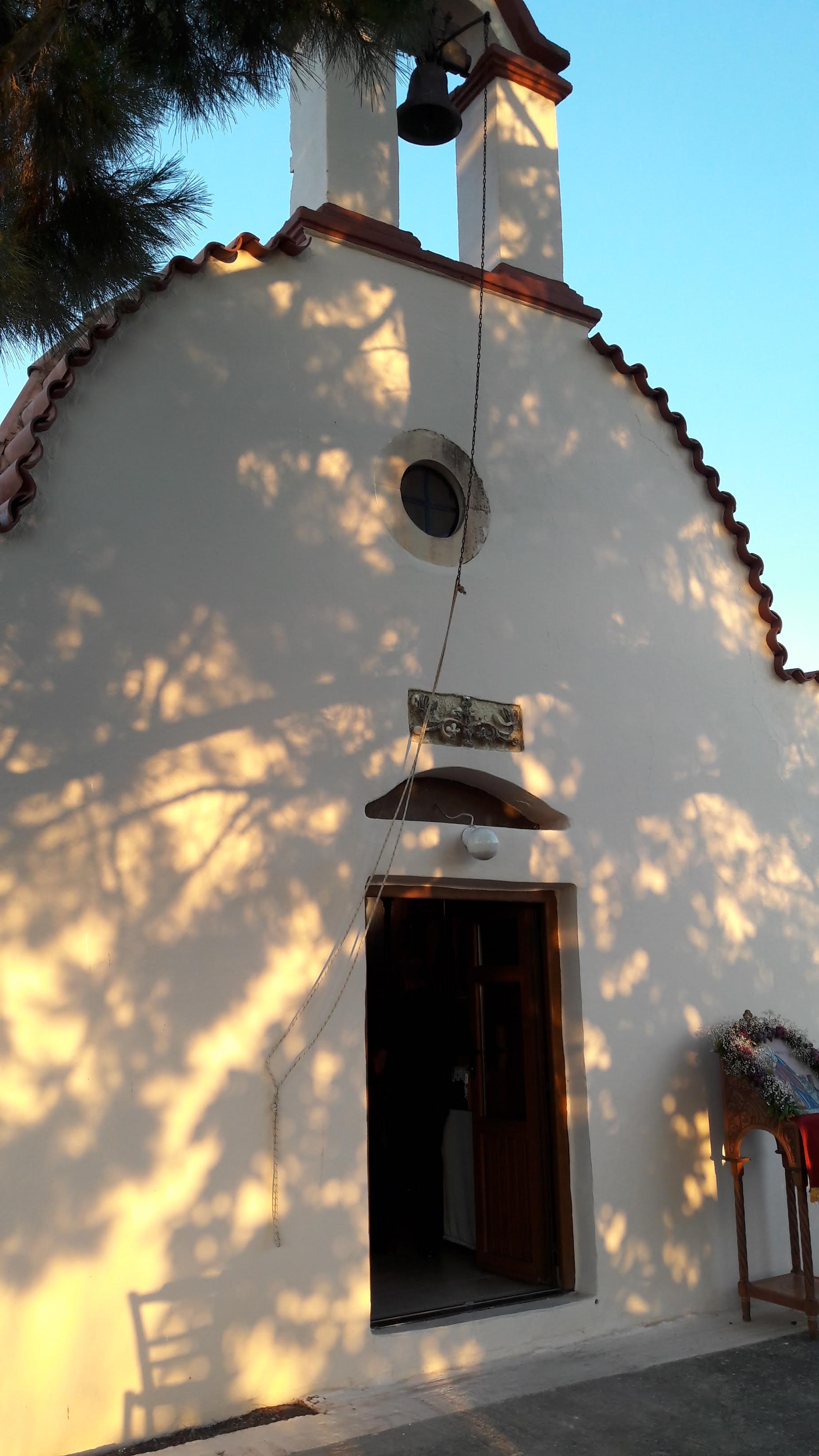 Αγία Μαρίνα, Καλανδαρές